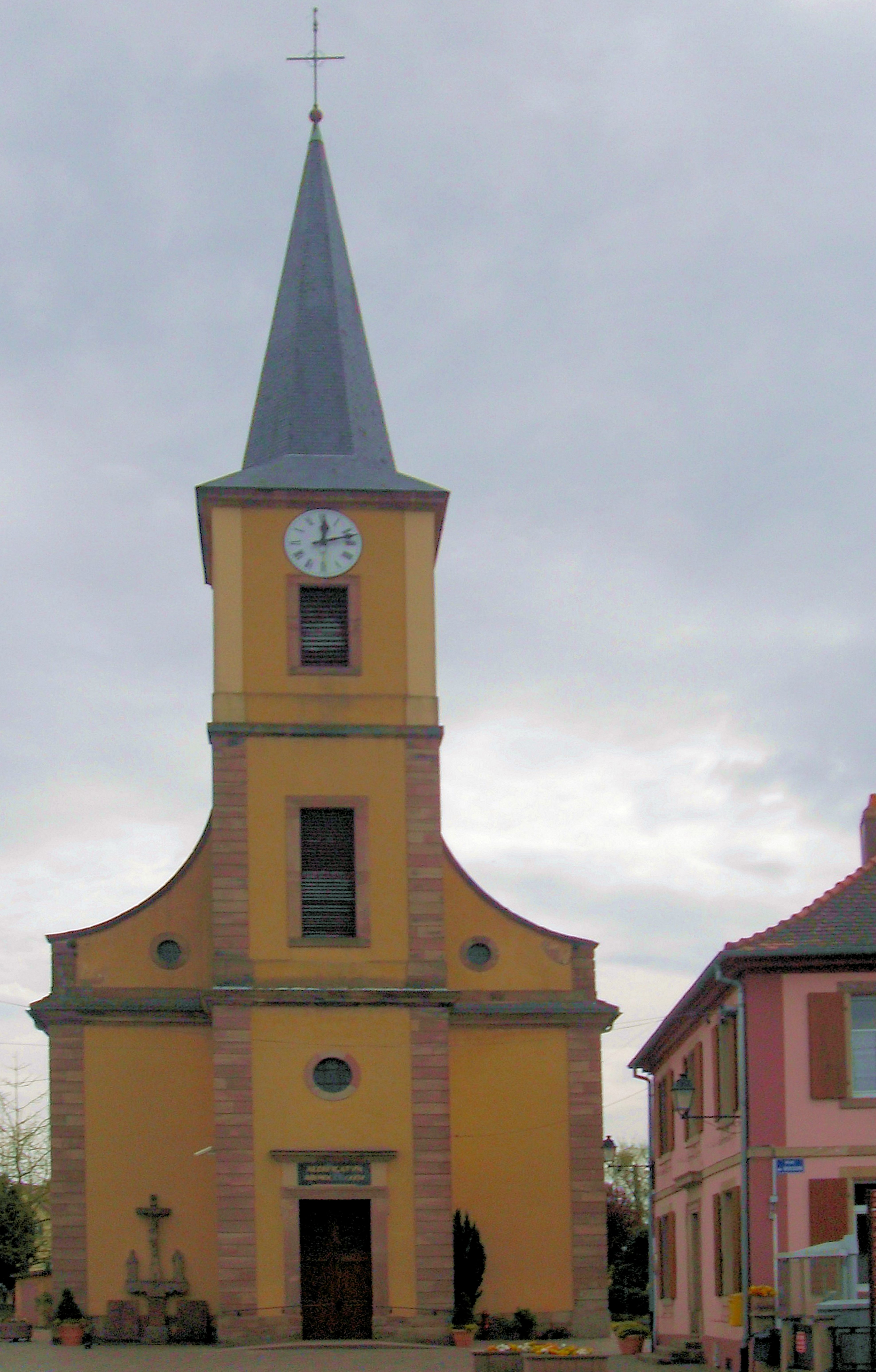 L'église Saint-Sigismond à Matzenheim, côté est